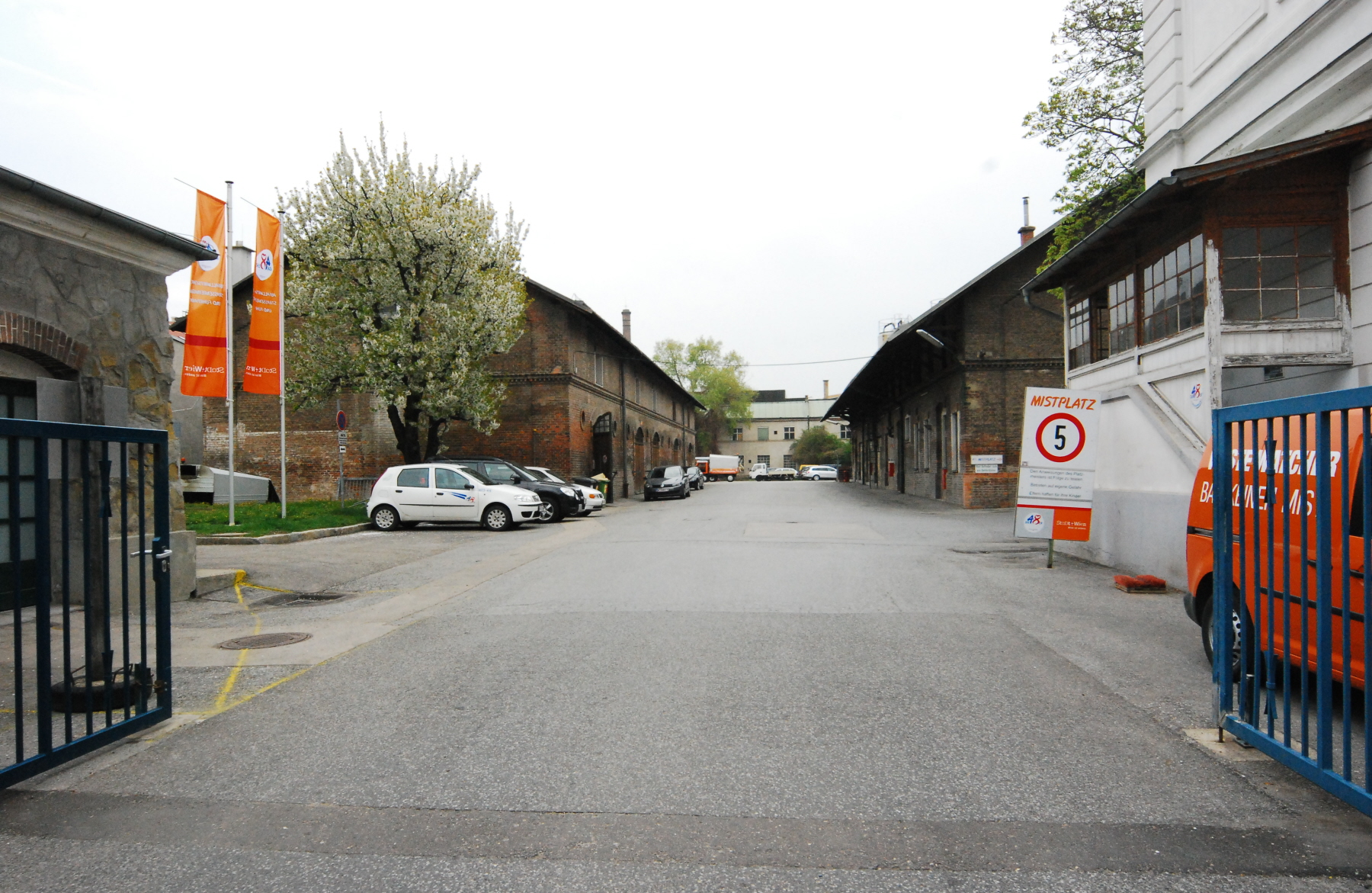 ehemaliges städtisches Schlachthaus Nussdorf in der Grinzinger Straße 151 in Wien-Döbling, heute Standort der MA 48 (Mistplatz Heiligenstadt)